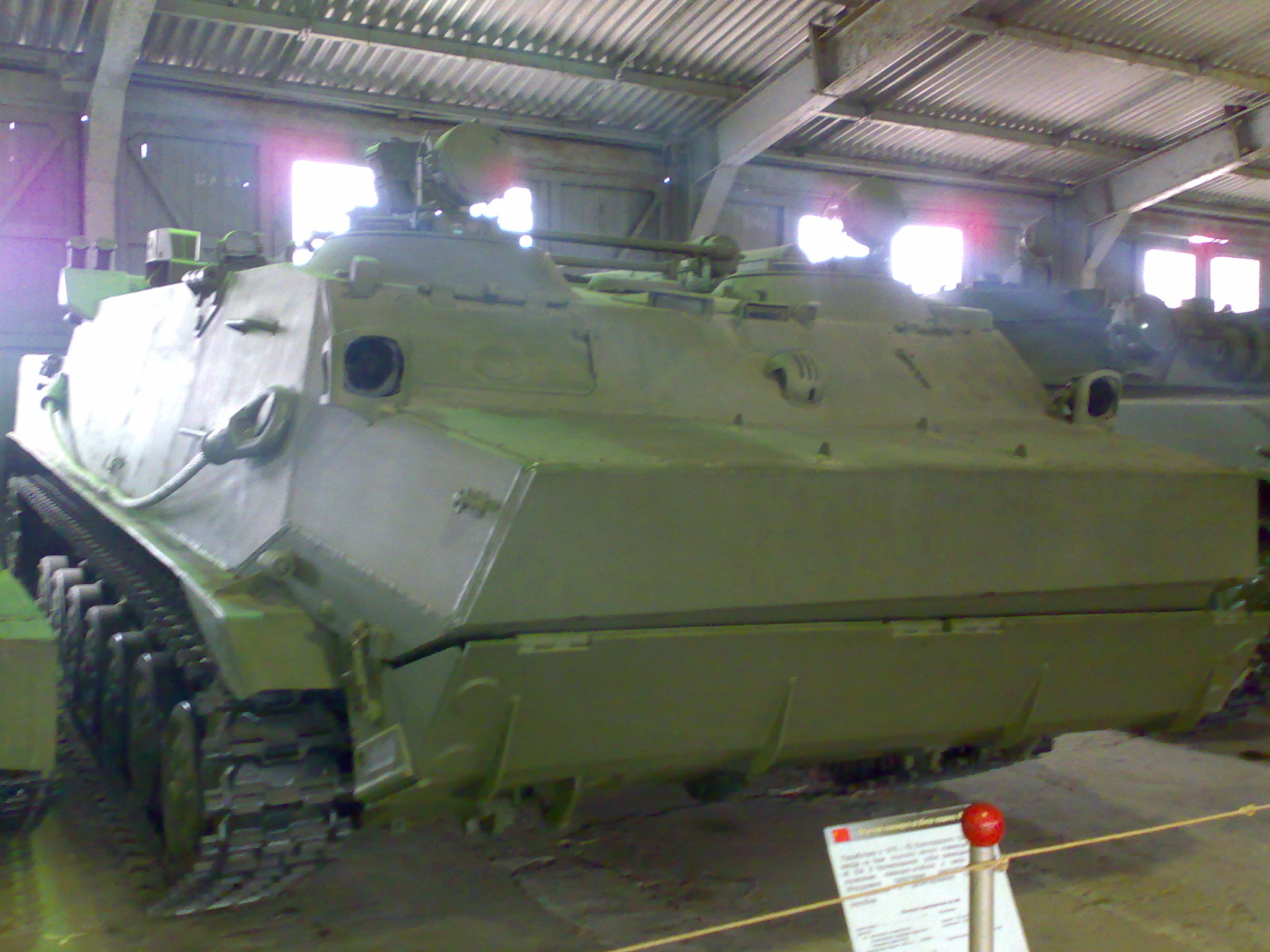 Объект 940 в Бронетанковом музее Кубинки.